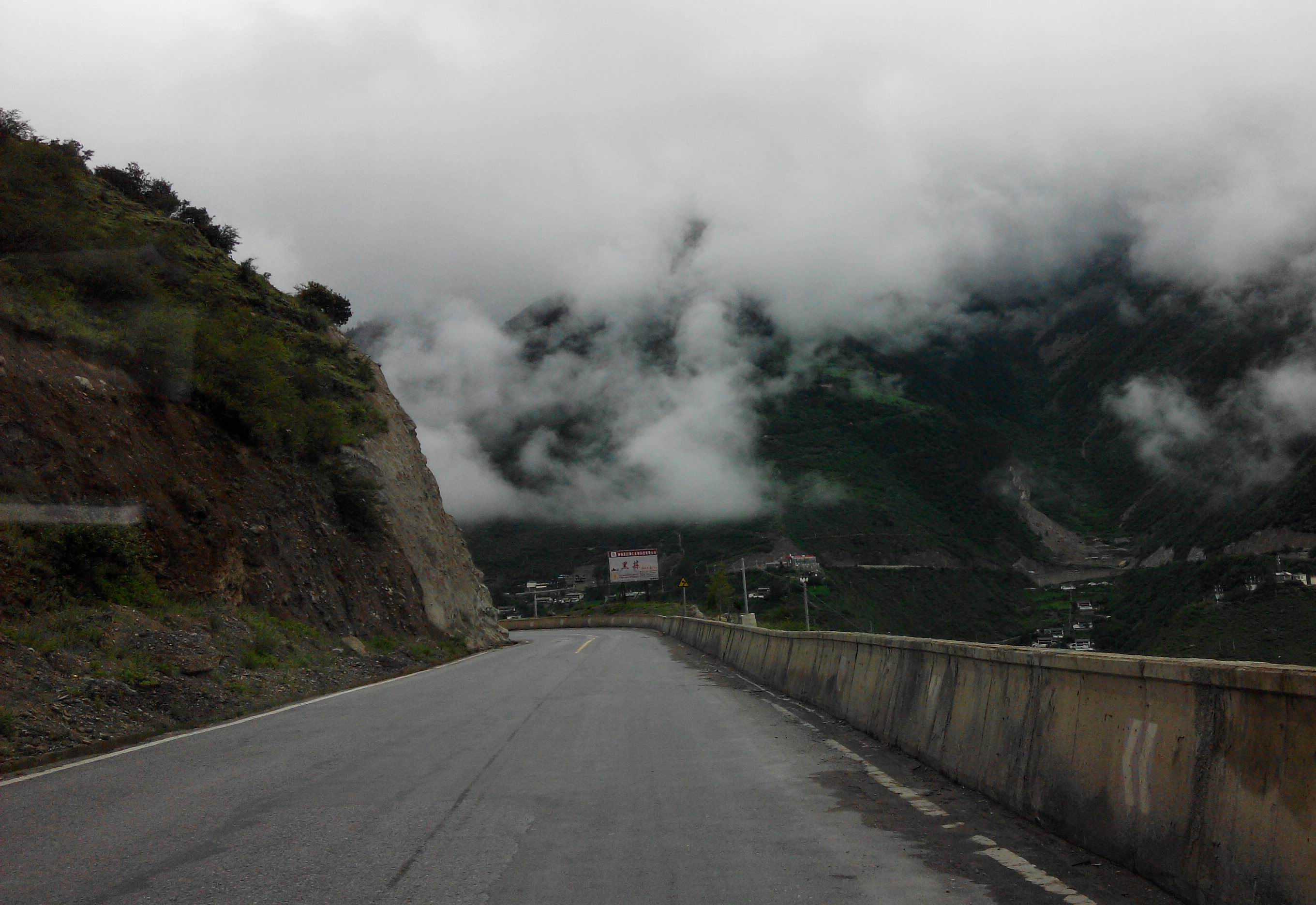 中国国道G214 香格里拉路段